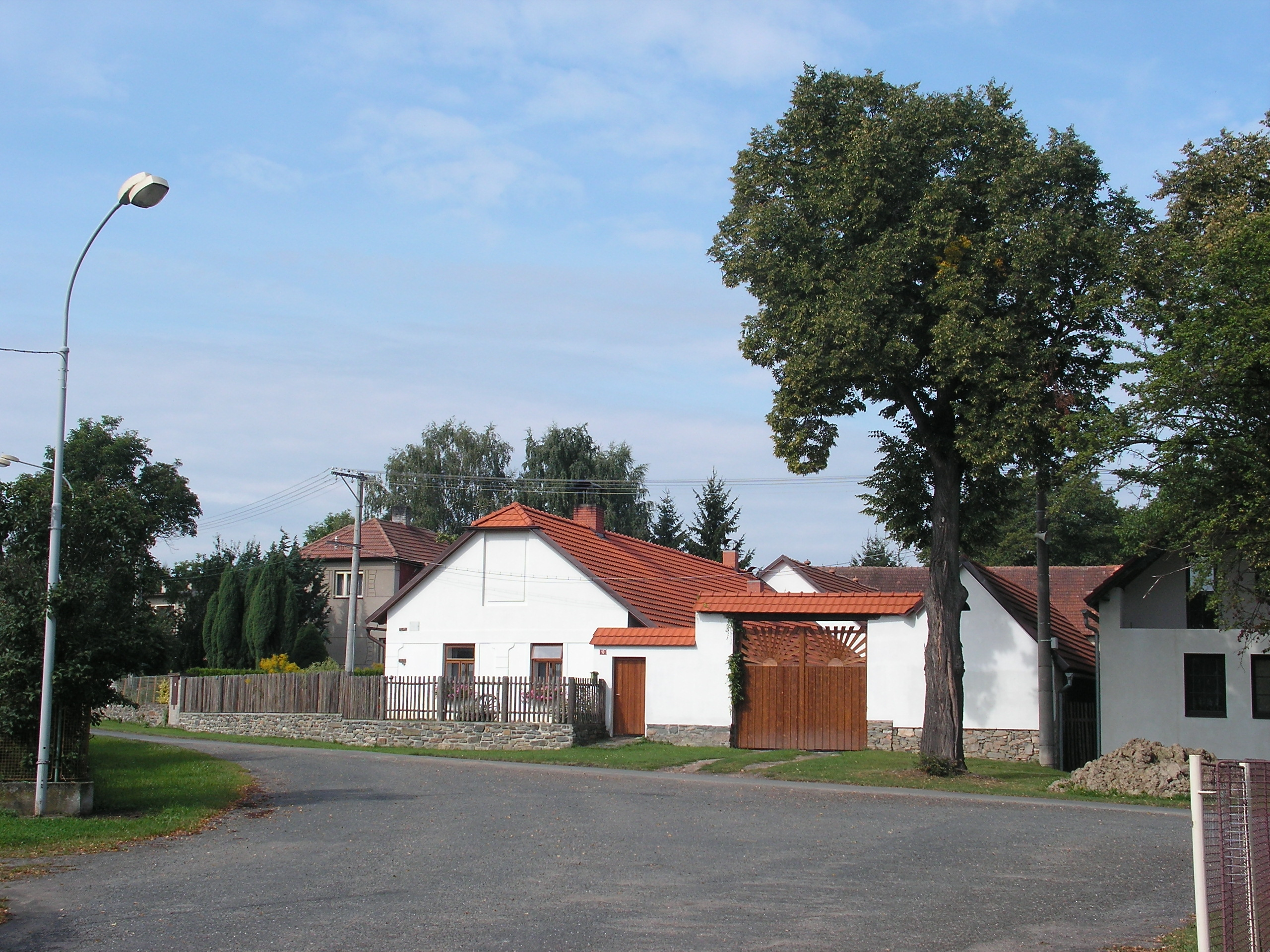 Pohled na část obce Hraběšín, která se nachází v okrese Kutná Hora.